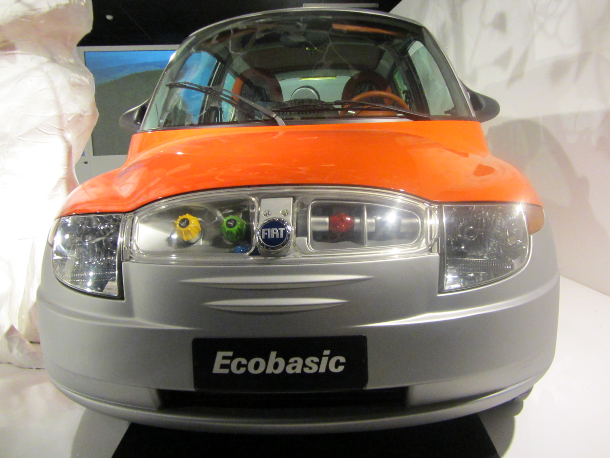 Museo Nazionale dell'Automobile di torino, concept eco friendly area. Modelli Fiat e Phoenix. nella foto Fiat Ecobasic, Italia 2000, motore 4 cilindri a iniezione diretta common rail. Cilindrata 1200cc 61CV a 3500giri. Vel Max: 160km/h alimentazione: Turbo Diesel